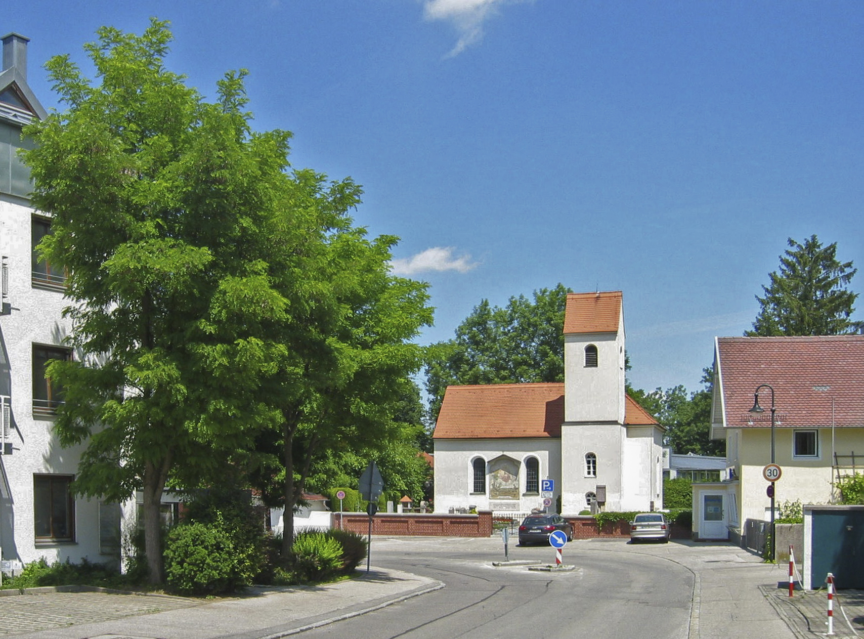 Der alte Ortskern Stockdorfs mit der St. Vitus Kirche